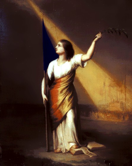 România rupându-şi cătuşele pe Câmpia Libertăţii ("Romania Breaking off Her Chains on the Field of Liberty")